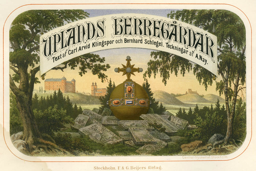 Uplands Herregårdar, panorama, teckning av Alexander Nay. Text af Carl Arvid Klingspor och Bernhard Schlegel. Stockholm - F. & G. Beijers förlag. Centraltryckeriet, Stockholm.